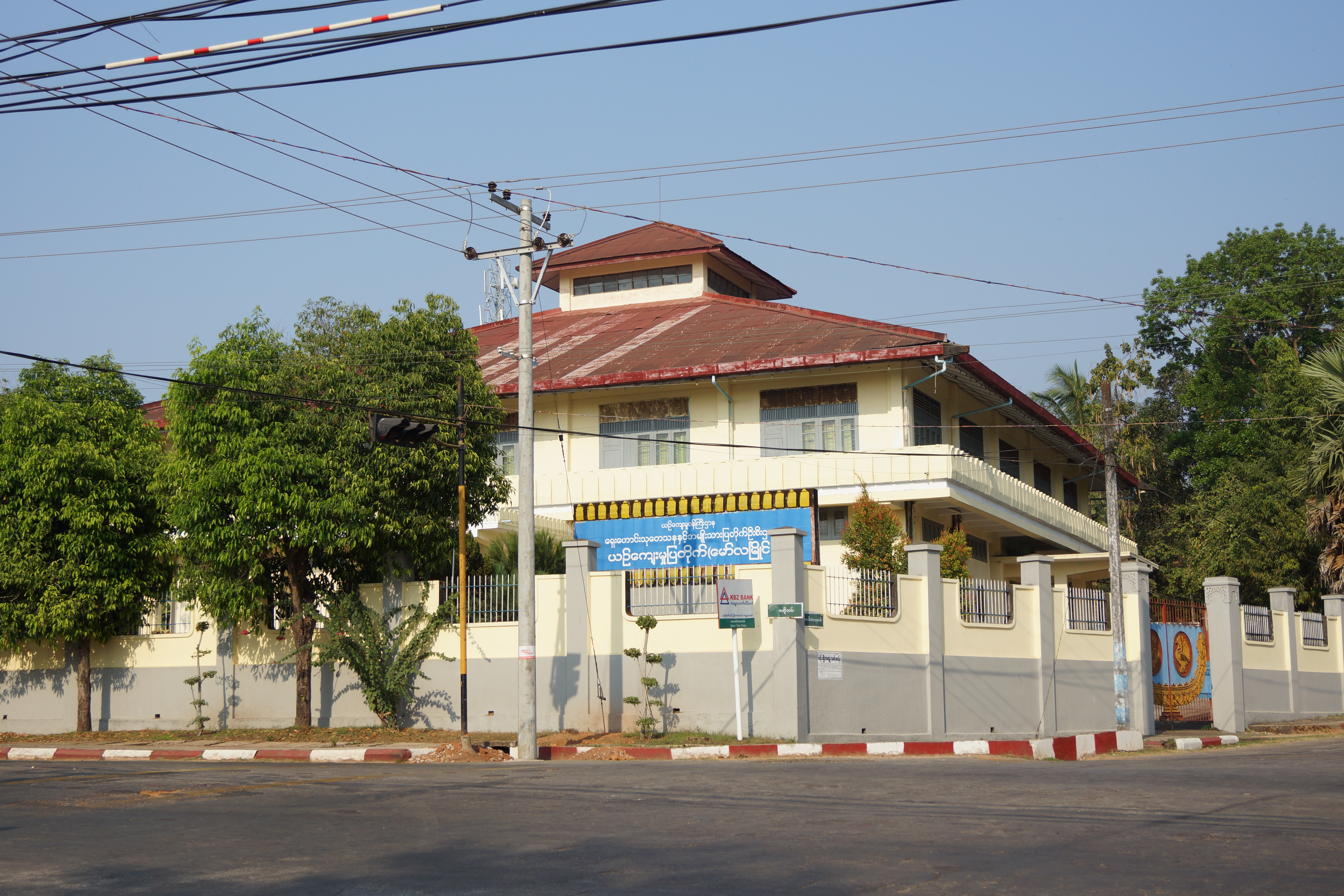 Mawlamyine MMR011001701, Myanmar (Burma)